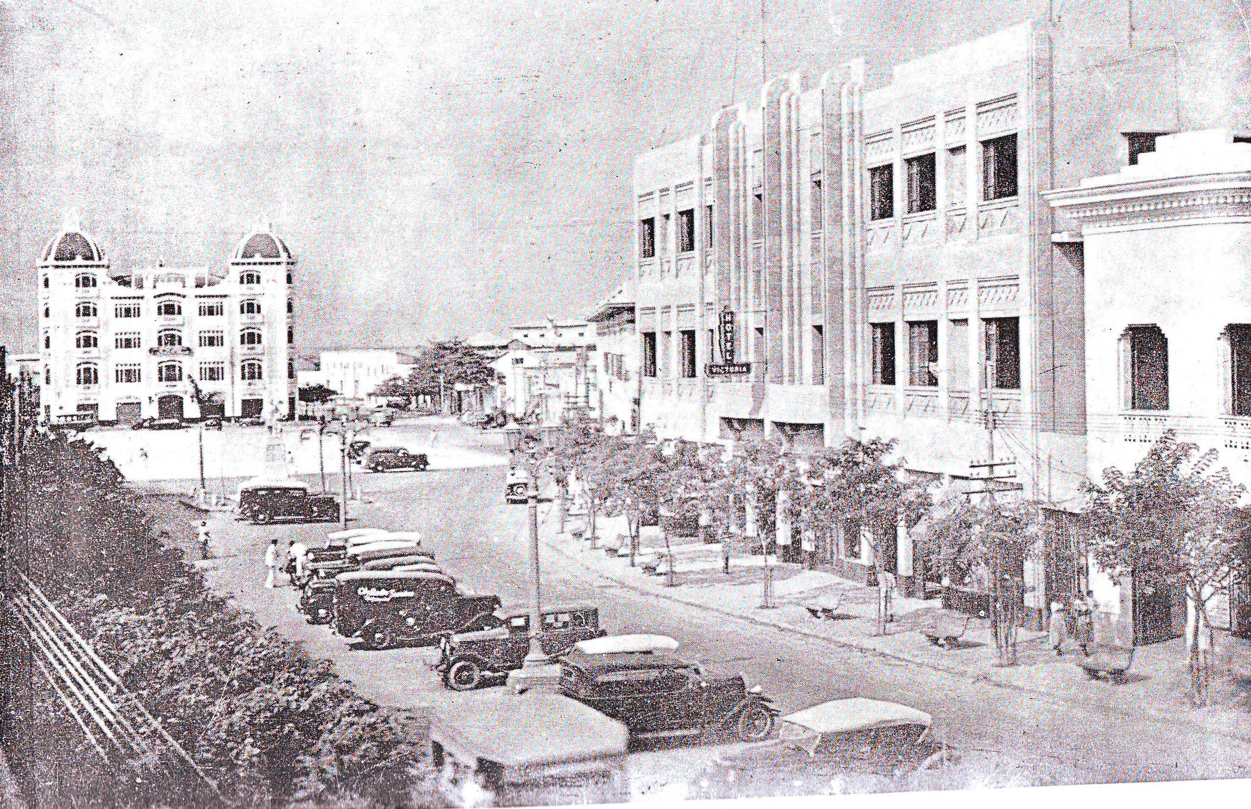 Paseo Bolívar, centro del comercio y negocios de la antigua Barranquilla (Atrás Edificio Palma (demolido) Foto de la década de 1930, Paseo Bolívar, centro de negocios de Barranquilla en la época, a ambos lados edificios netamente republicanos.